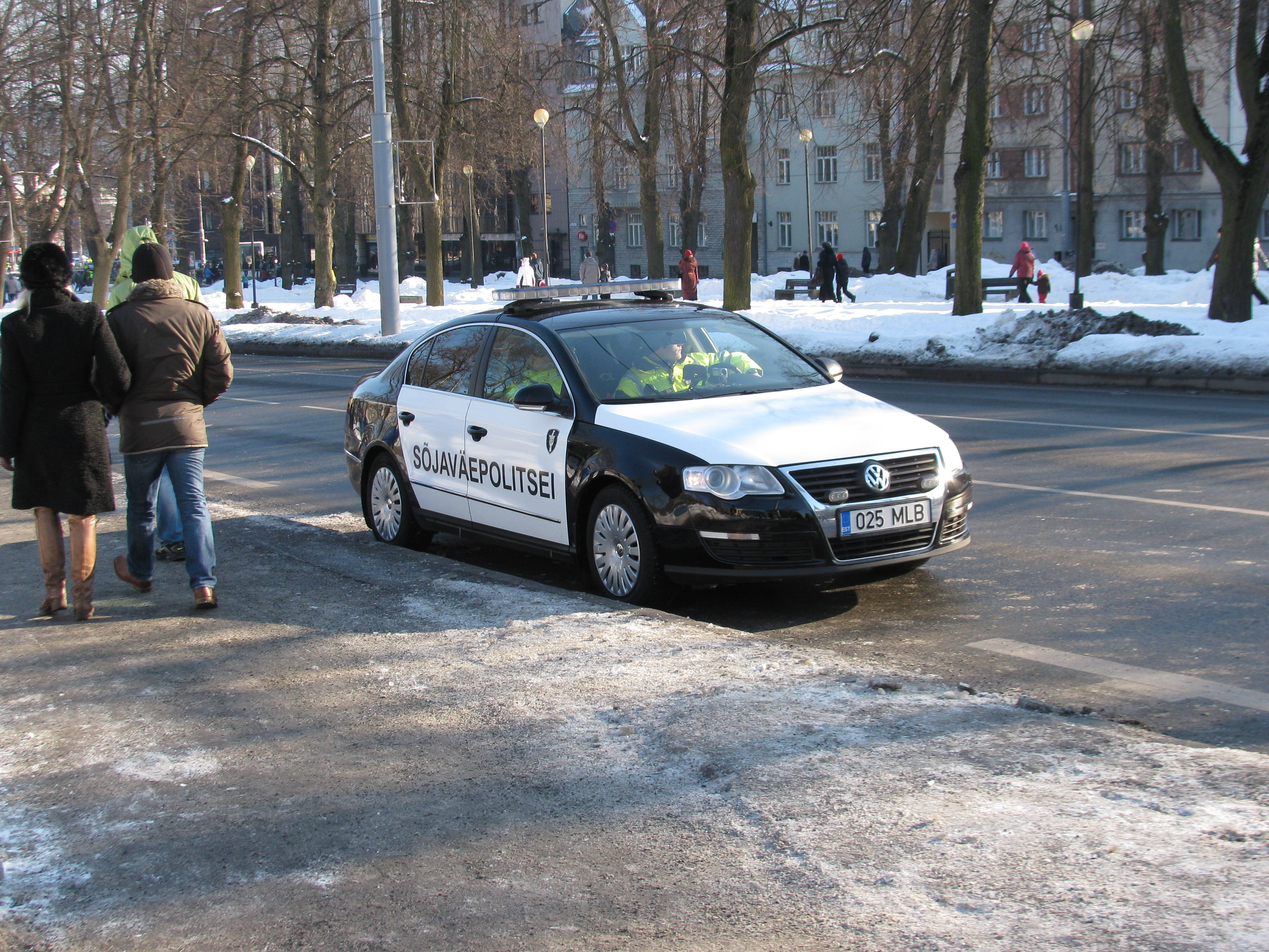 Sõjaväepolitseiauto Tallinnas